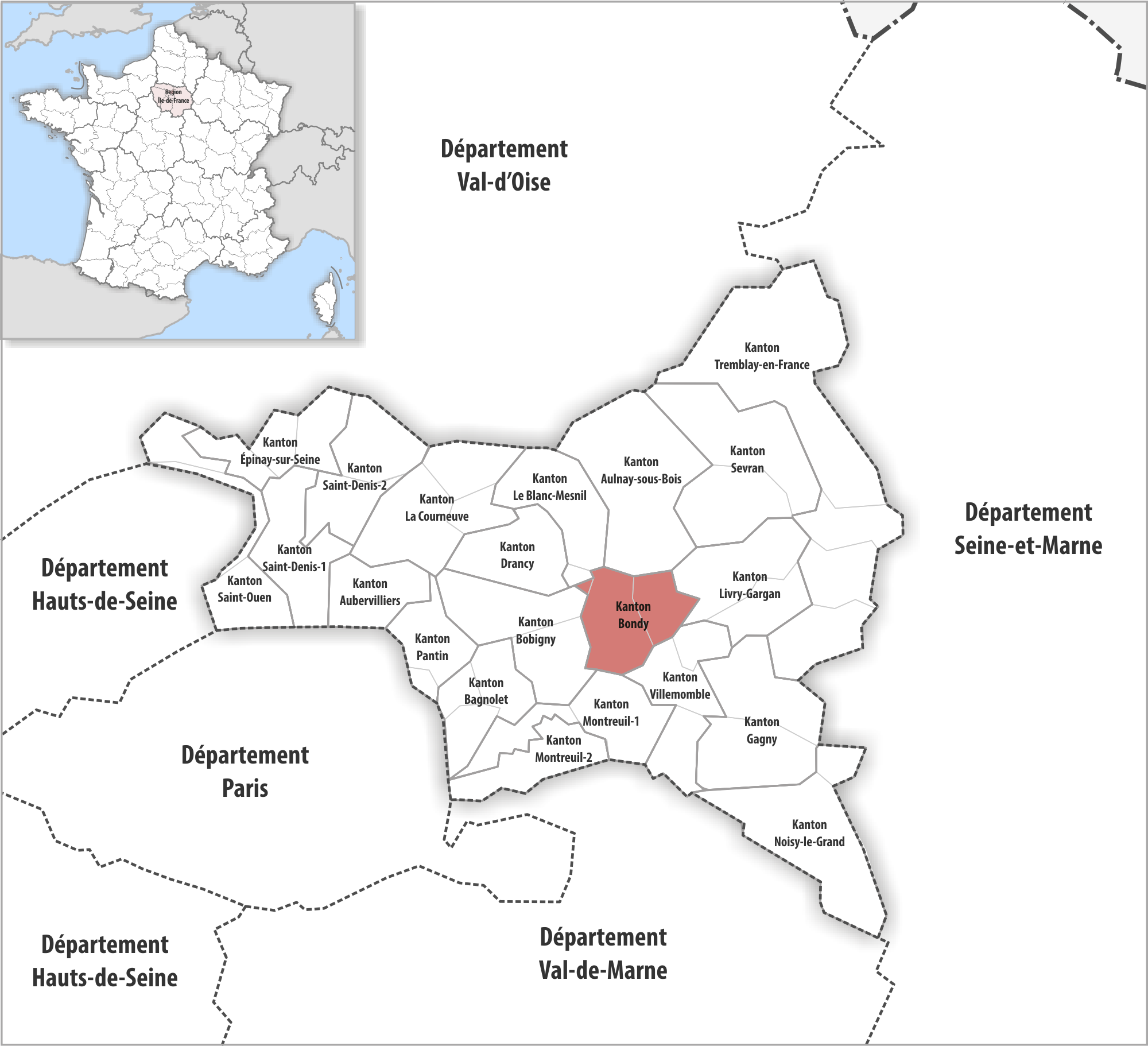 Lage des Kantons Bondy